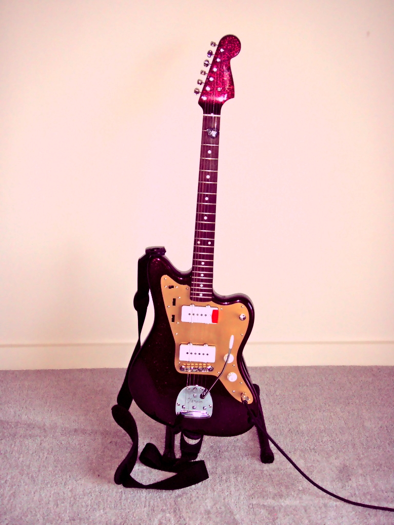 Fender Japan Jazzmaster